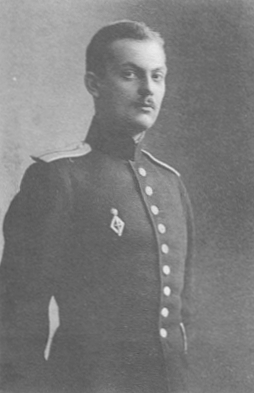 князь Борис Александрович Голицын офицером Кавалергардского полка.